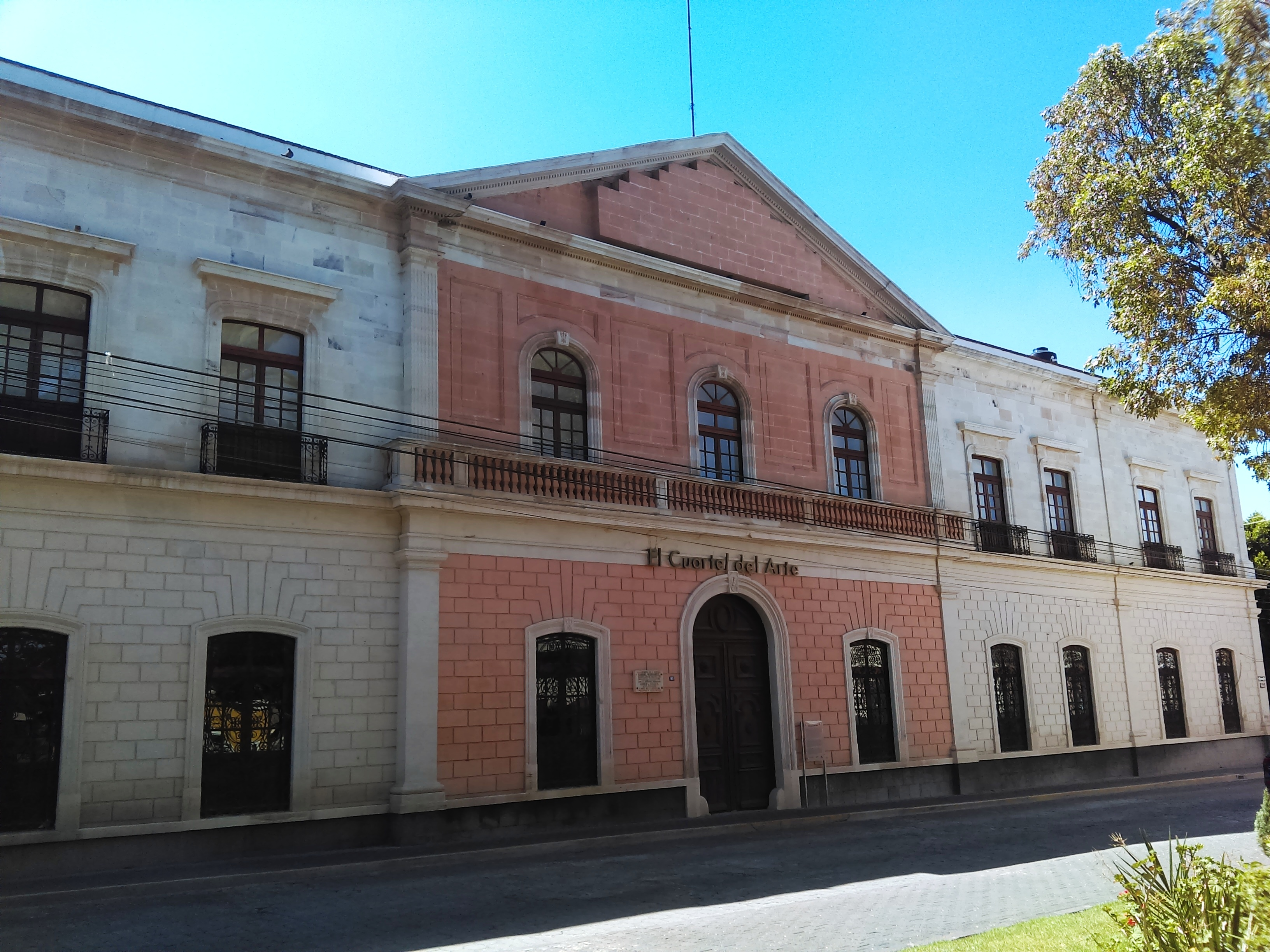 Cuartel del Arte en Pachuca, Hidalgo